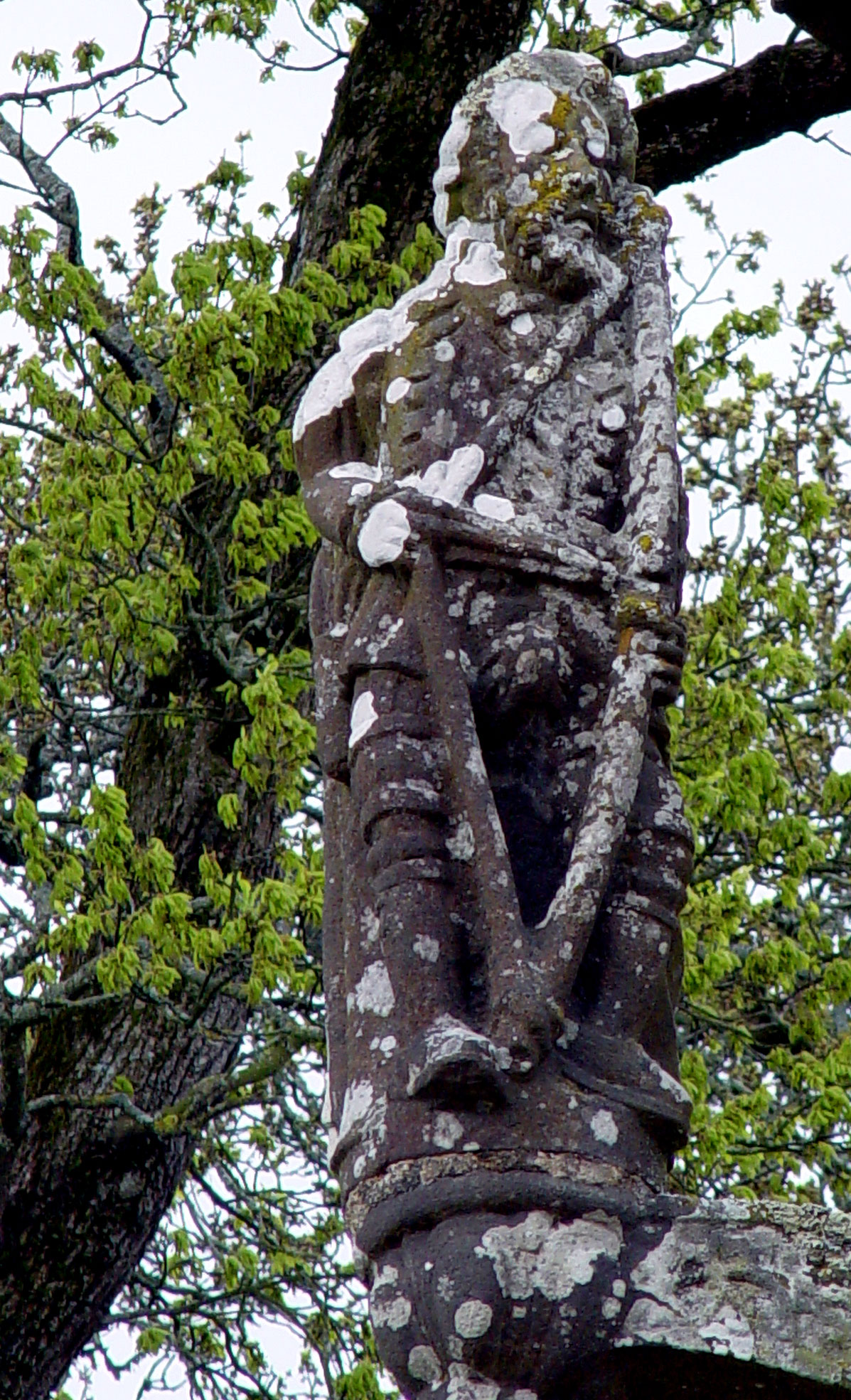 Saint-Segal (Bretagne, Finistere) Kapelle des Heiligen Sebastian, Calvaire: Bogenschütze